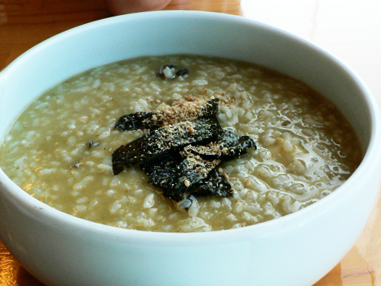 Jeonbokjuk, Korean abalone porridge